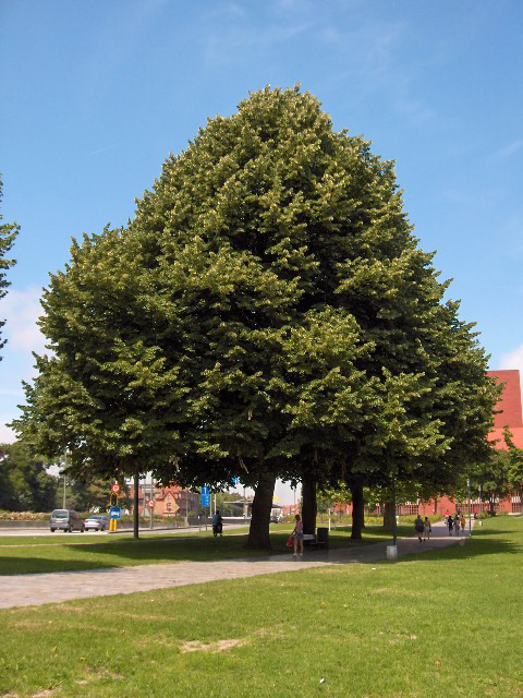 Species Tilia tomentosa Family Malvaceae